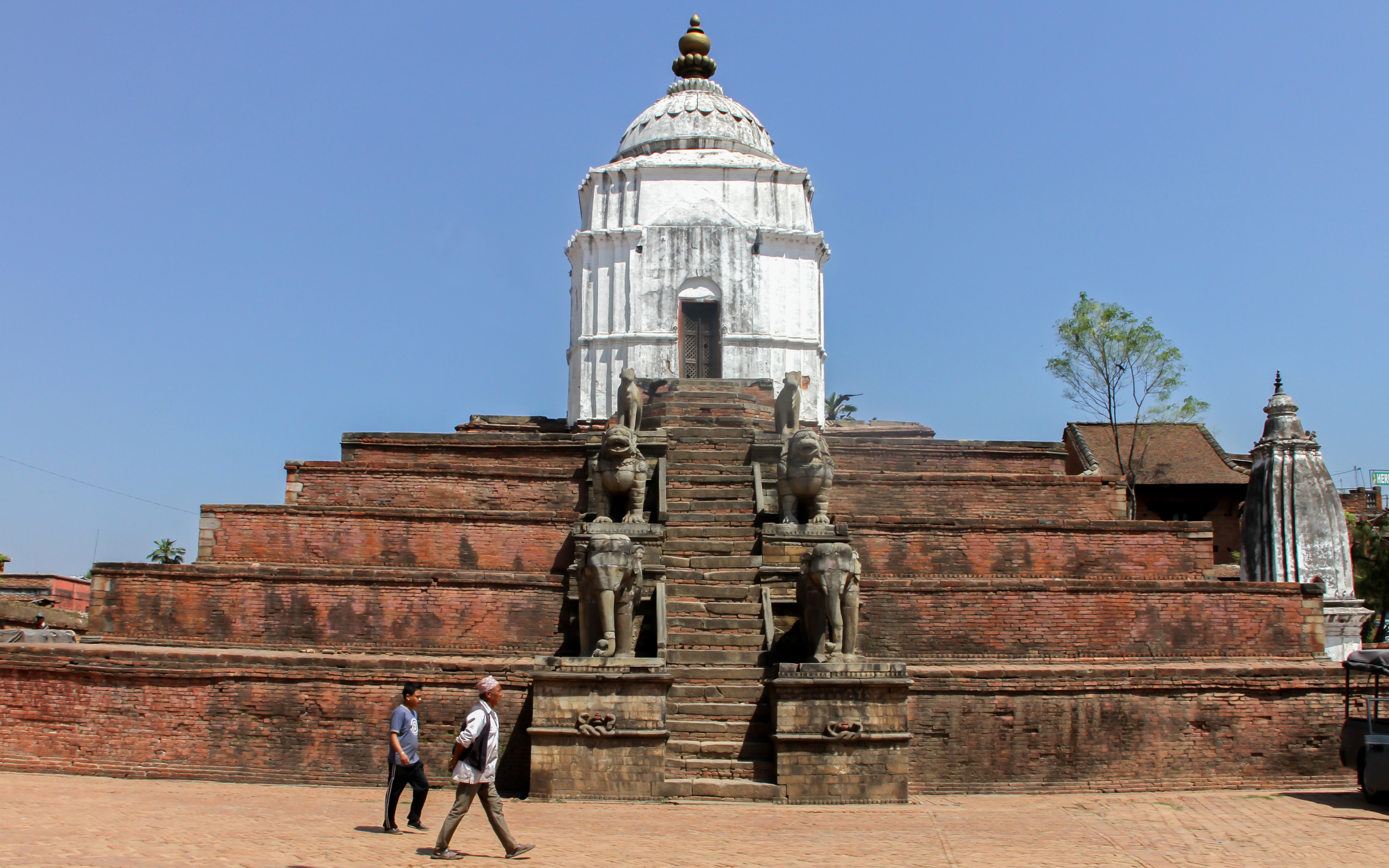 Bhaktapur, Phasi Dega Mandir